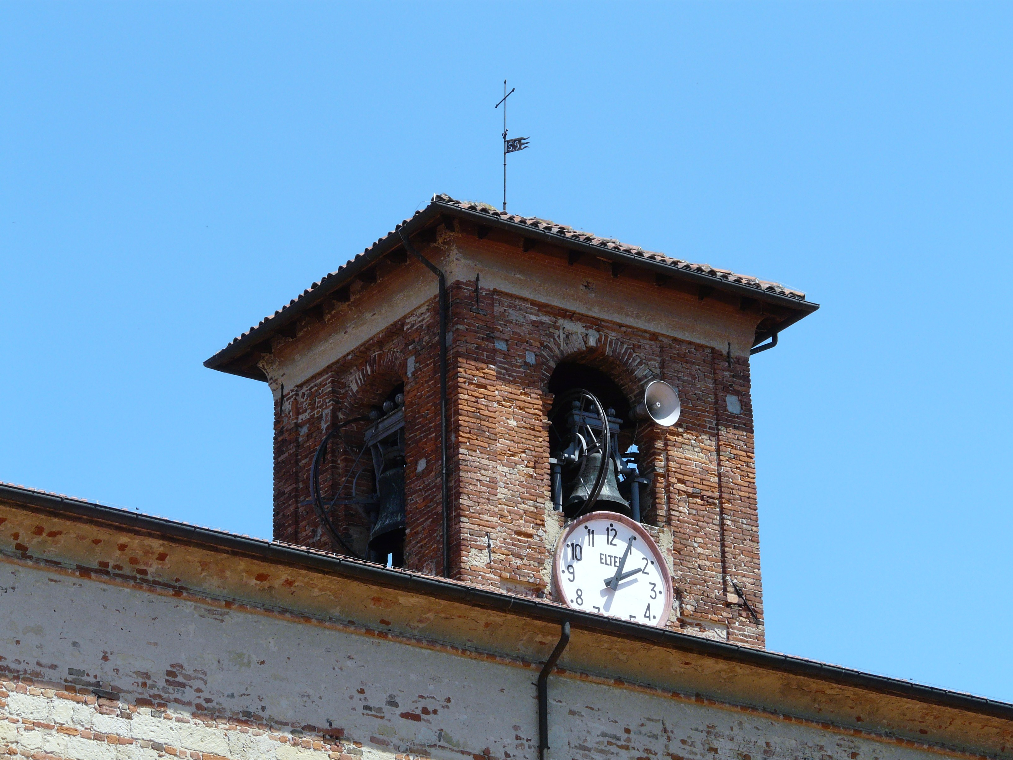 Campanile della Chiesa di San Giulio, Altavilla Monferrato, Piemonte, Italia